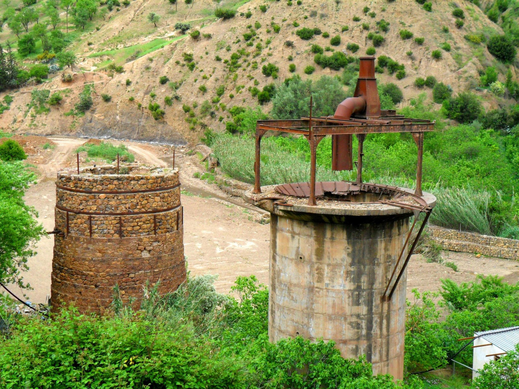 Breira (mines de fer) - wilaya de Chlef